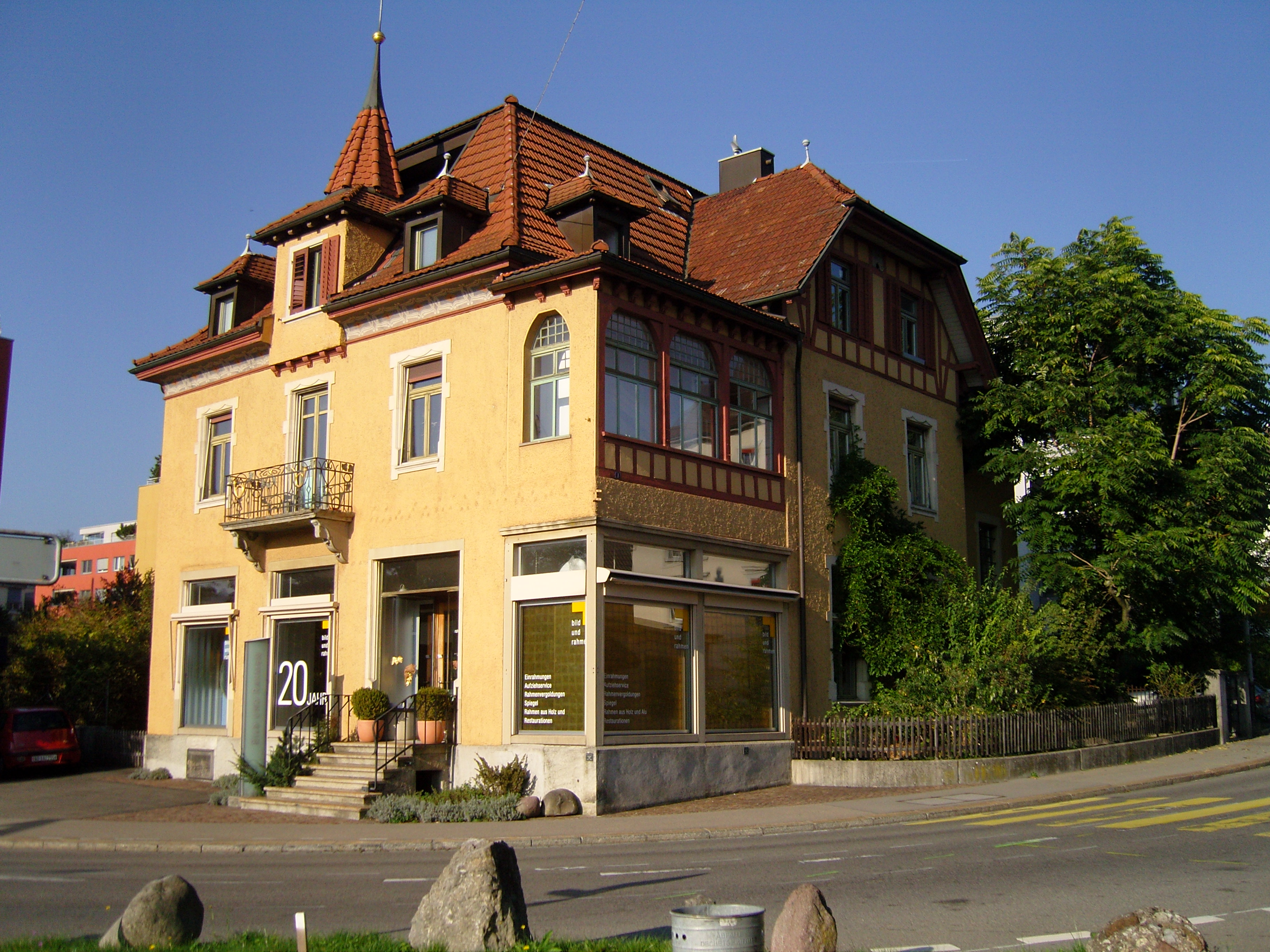 Ansicht des Hauses von Südosten